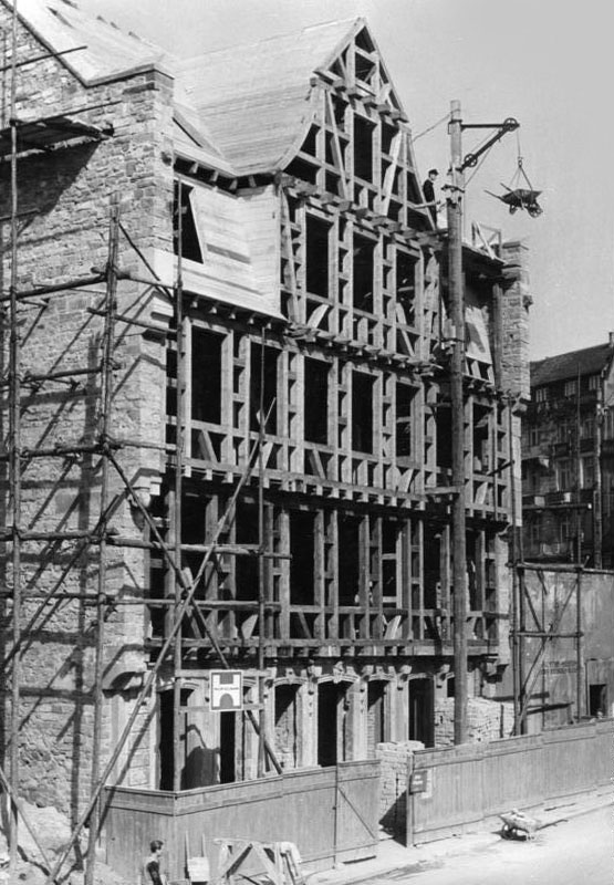 Frankfurt/Main, Wiederaufbau Goethehaus Illus/Philipps Mai 1949 Das Goethehaus in Frankfurt/Main im Rohbau